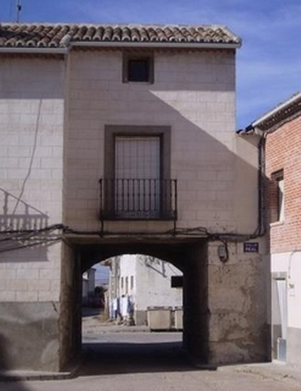 Puerta de antigua muralla medieval de Cevico Navero (Palencia, Castilla y León)